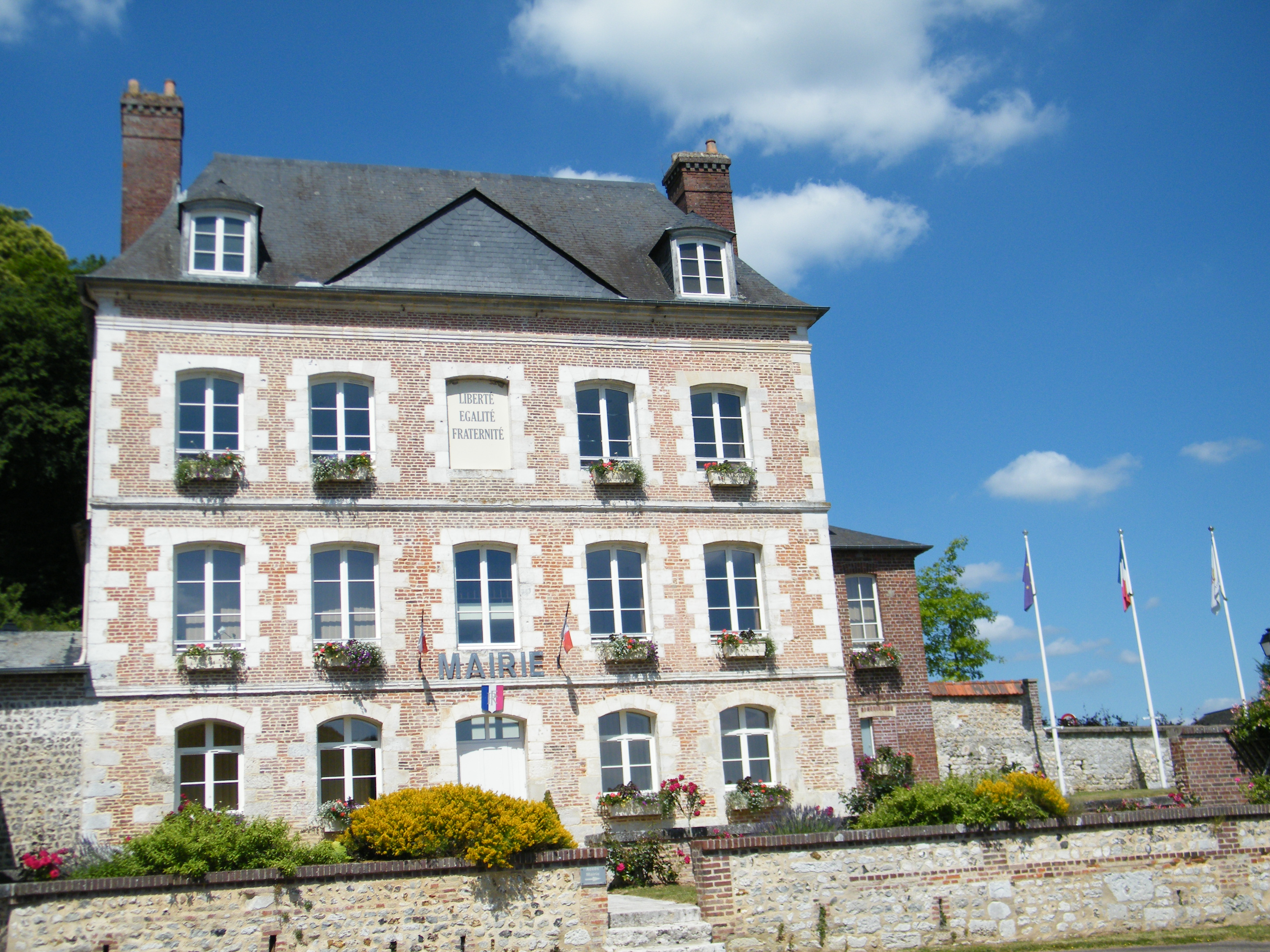 Villequier, Seine-Maritime, mairie.